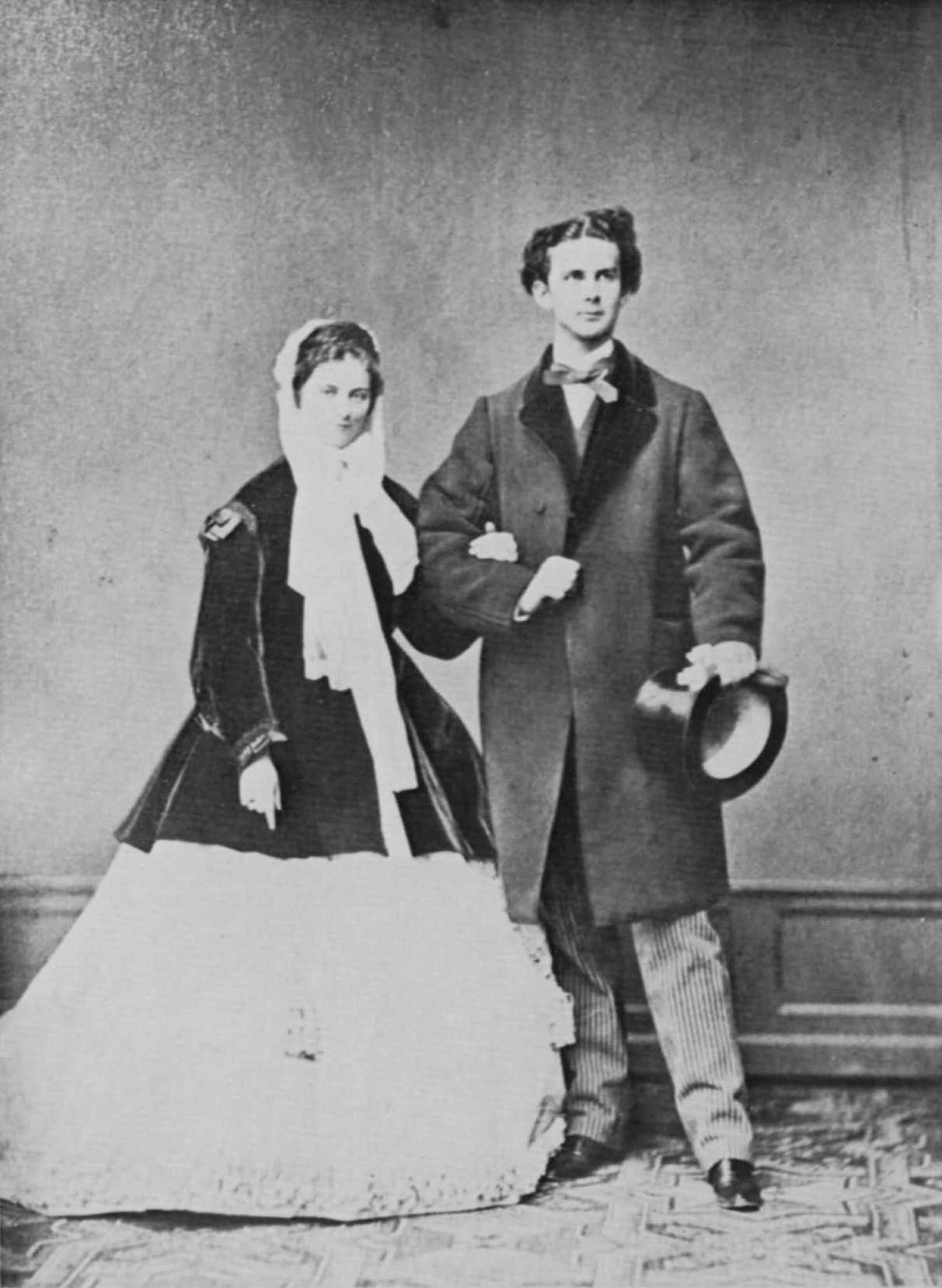 Joseph Albert: Offizielles Verlobungsphoto König Ludwigs II. mit Prinzessin Sophie von Bayern.